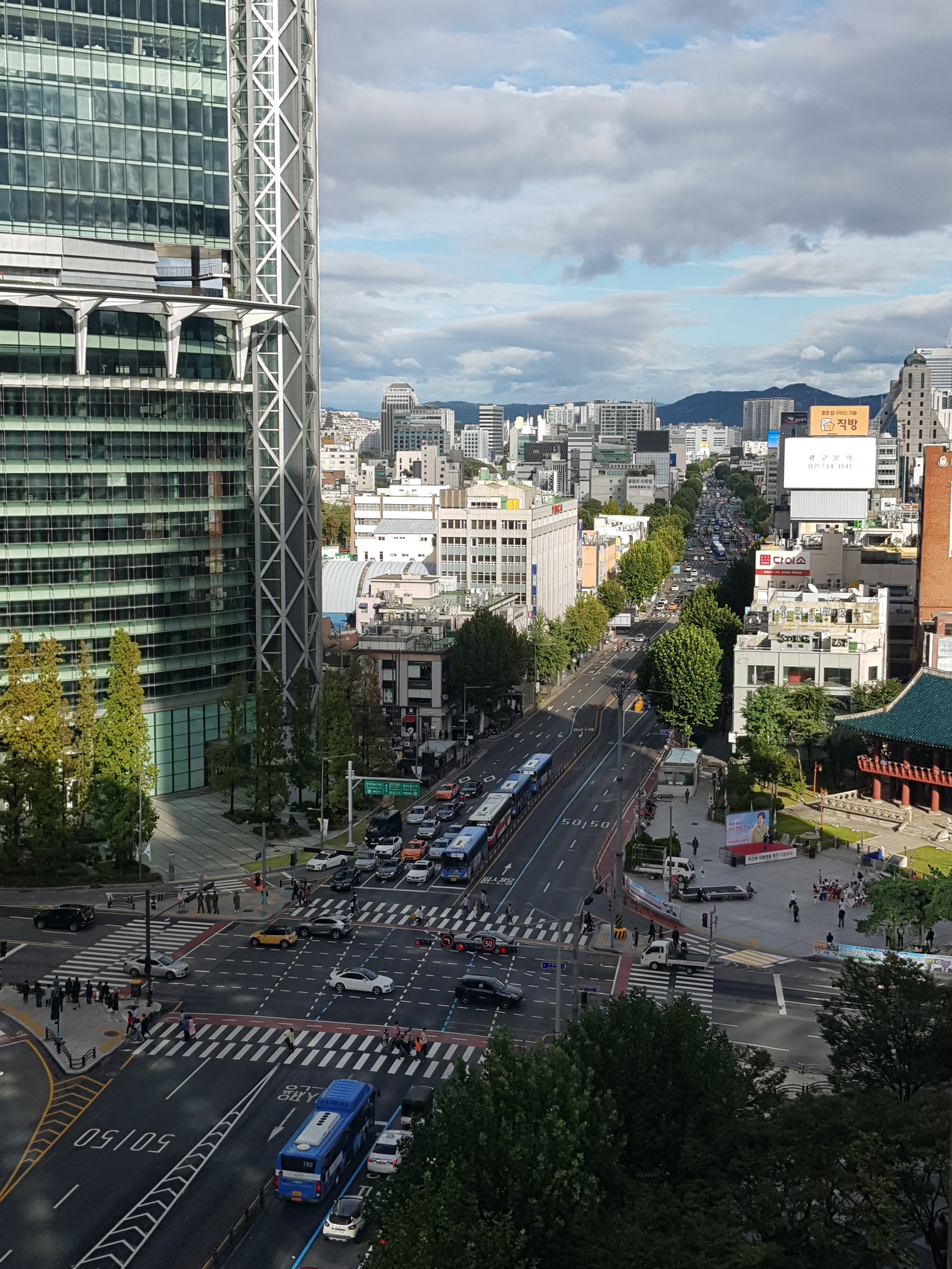 2018년 10월 촬영한 종로1가의 풍경